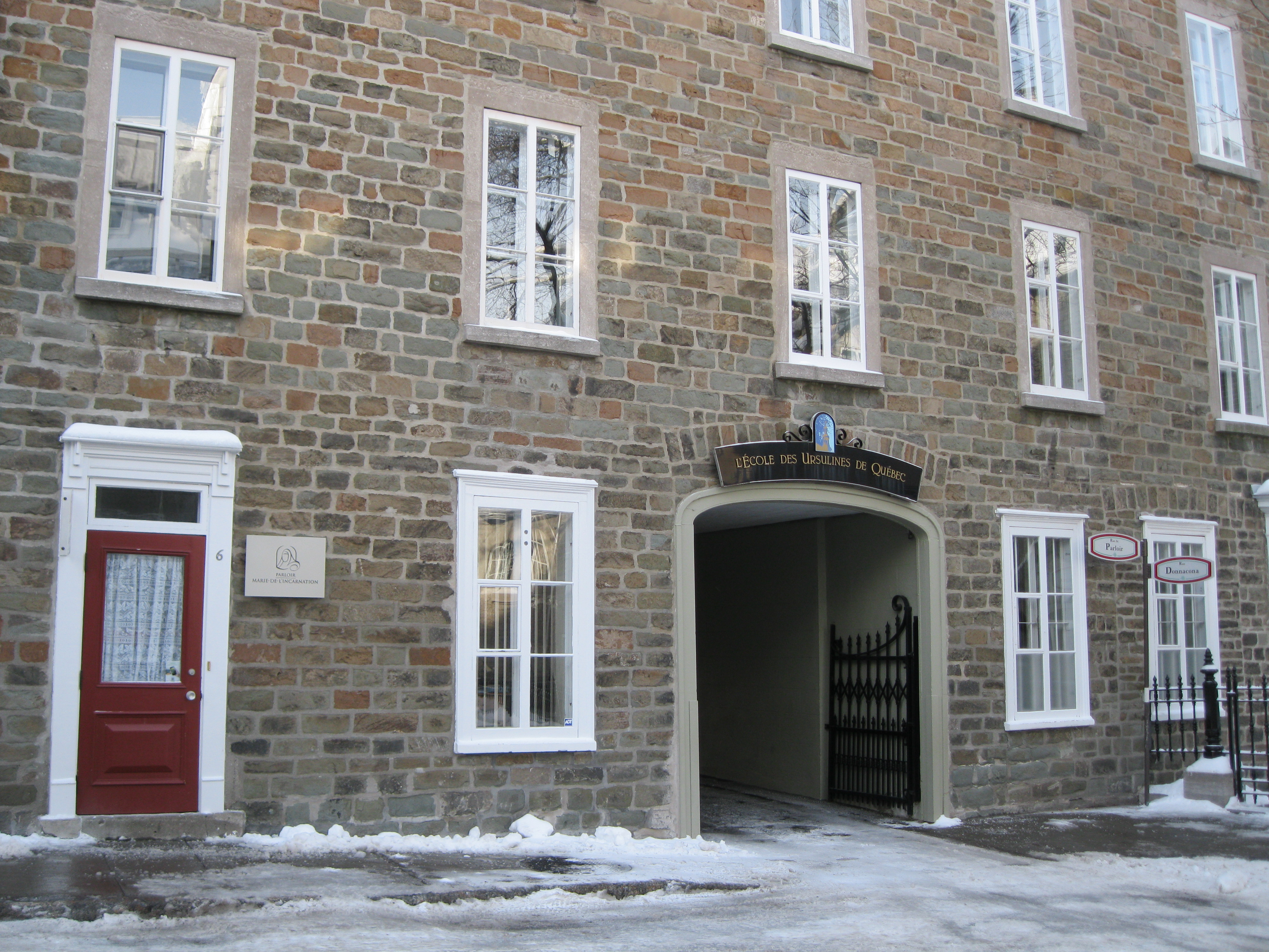 École des Ursulines de Québec